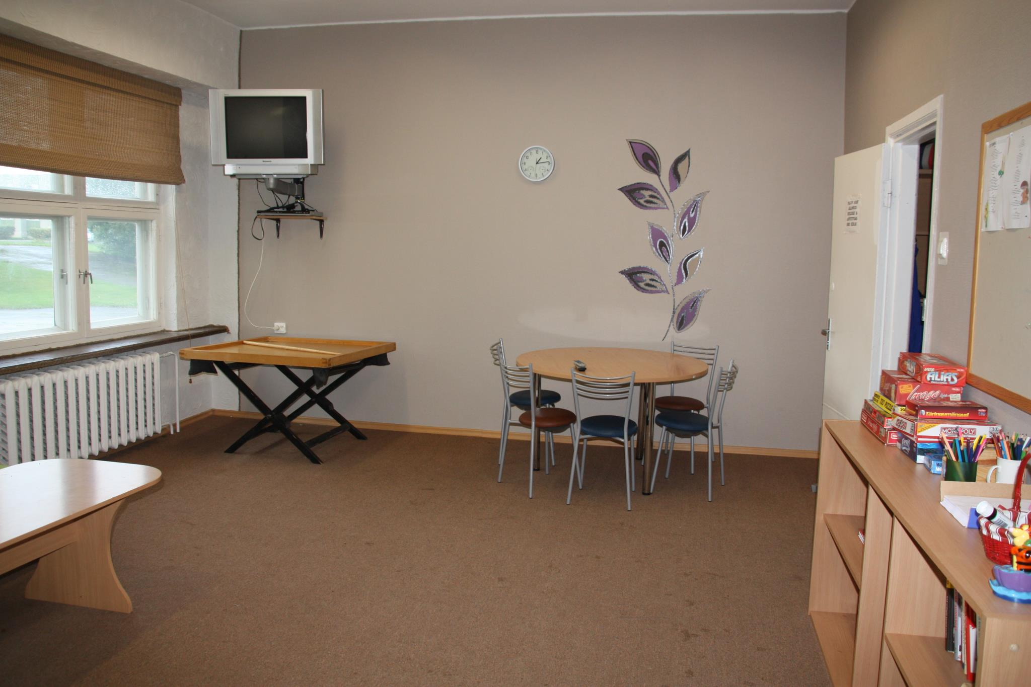 Aruküla Noortekeskus